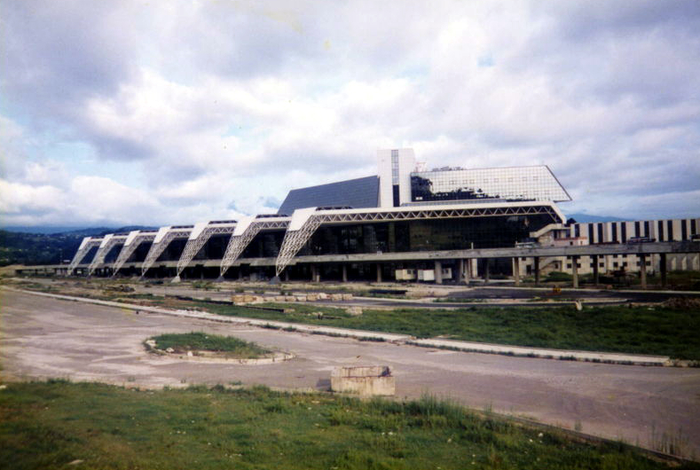 Новое здание аэровокзала "Сочи"